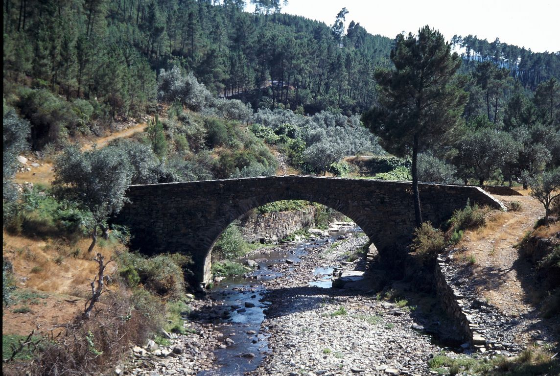 Ponte velha na freguesia de Ermida, concelho da Sertã.